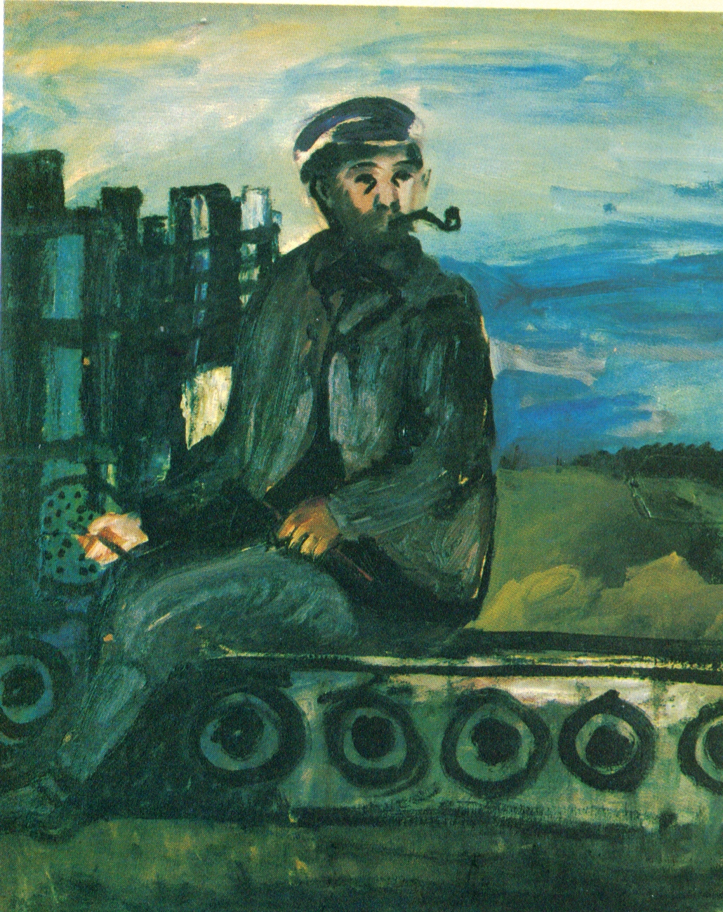 Картина художника Р. Семашкевича "Мужская фигура"